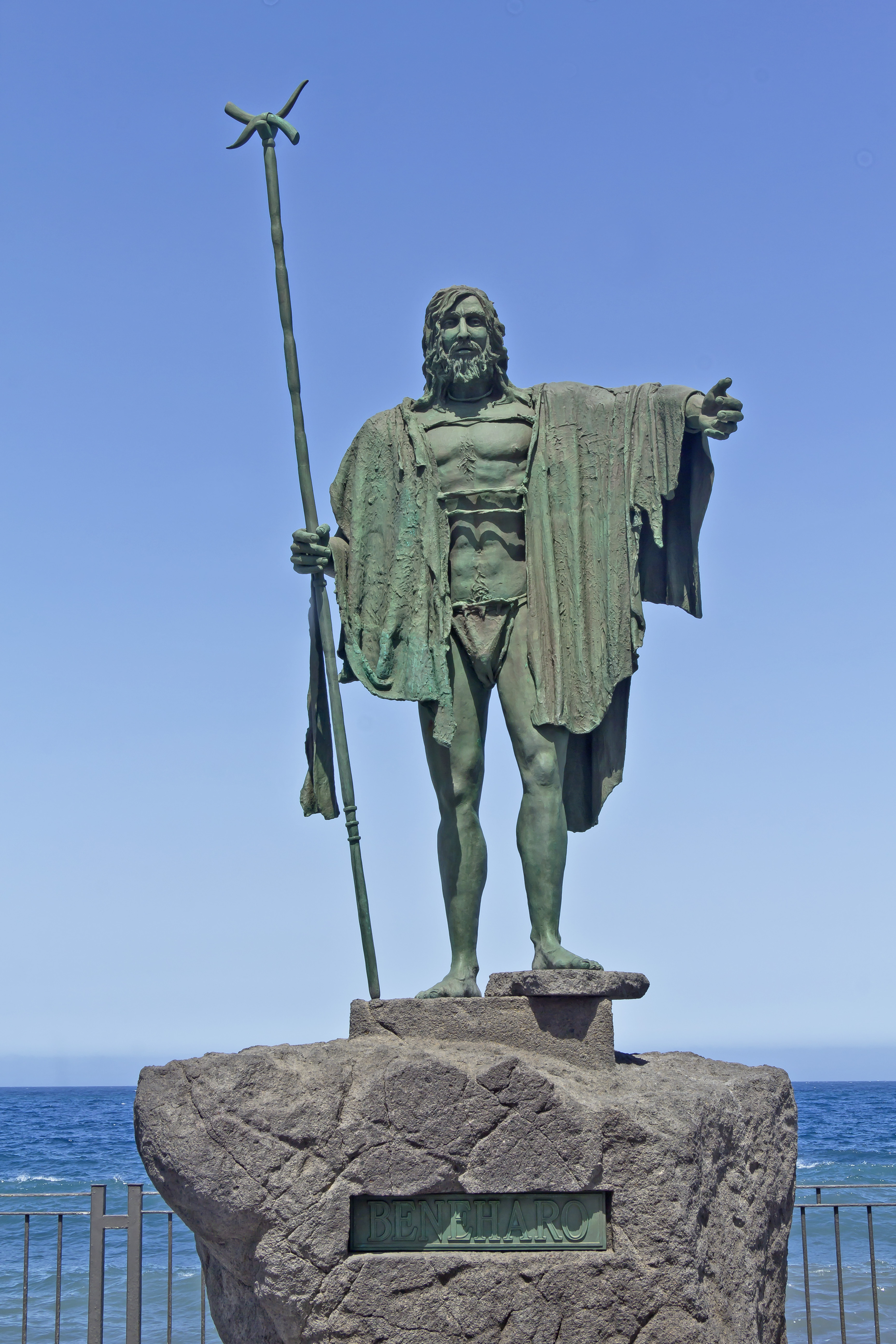 Die Plastik des Mencey Beneharo auf der Plaza de la Patrona de Canarias in Candelaria, Teneriffa, Spanien wurde von José Abad geschaffen.